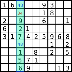 Par i samme række eller kolonne